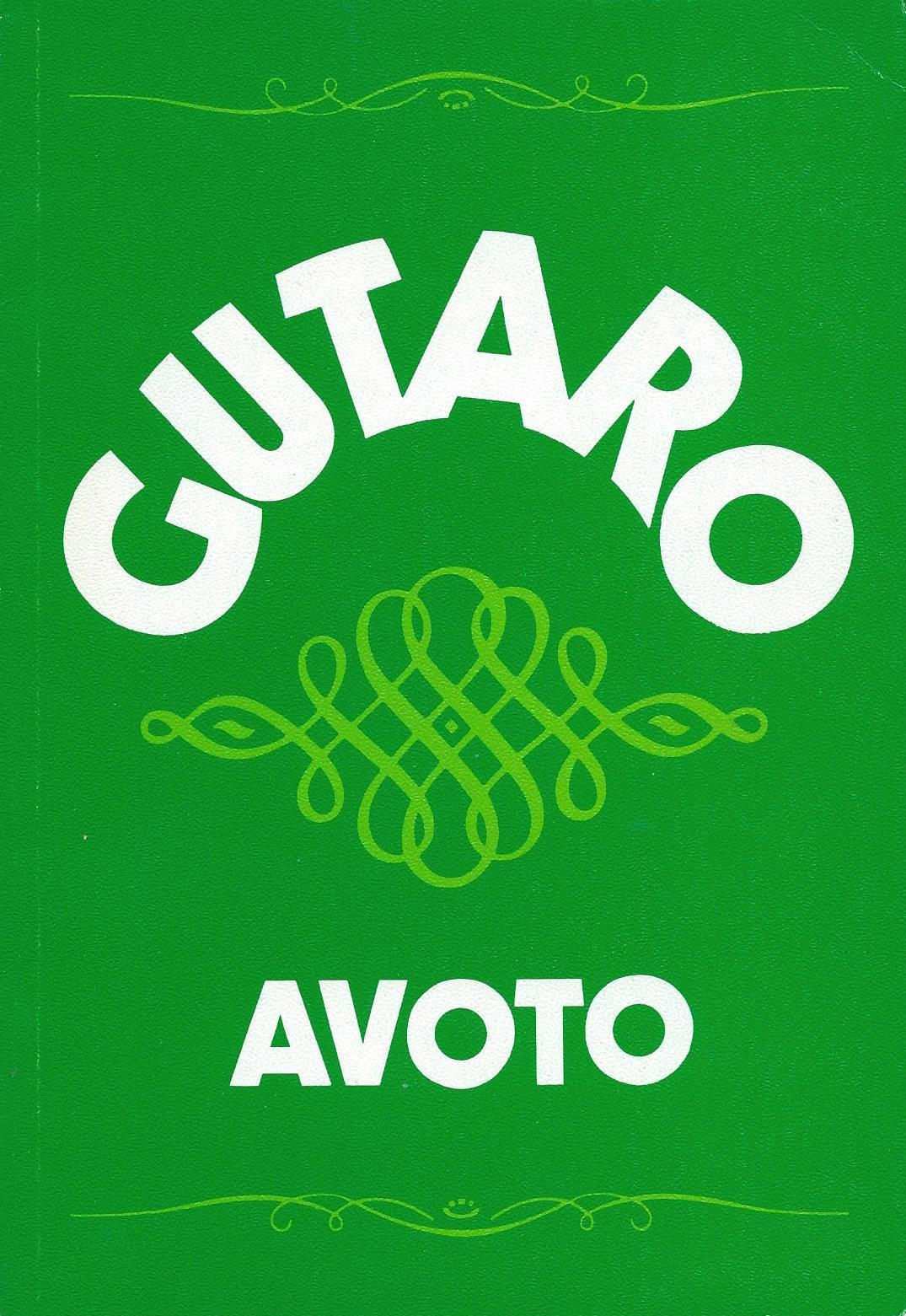 librokovrilo "Gutaro", 1979